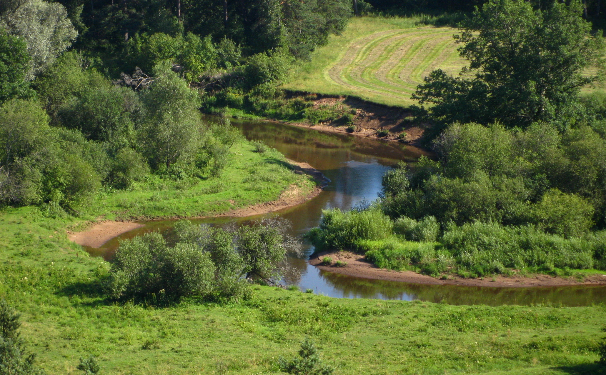 Mustjõgi Tellingumäe vaatetornist Koiva-Mustjõe MKA